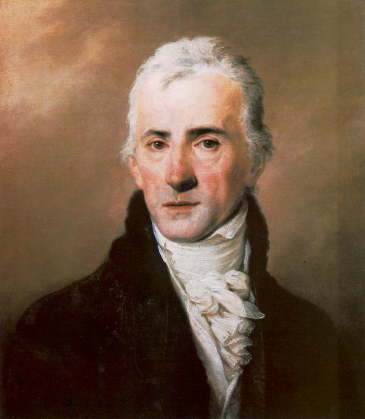 Ferenc Kazinczy, Budapest, Ungarische Akademie der Wissenschaften